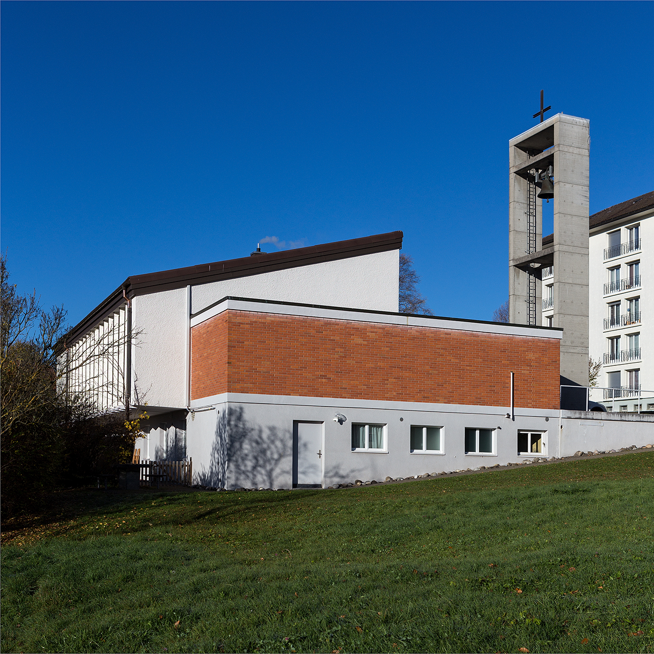 Katholische Kirche (1958) von Gressort & Lüscher in Reconvilier (BE)